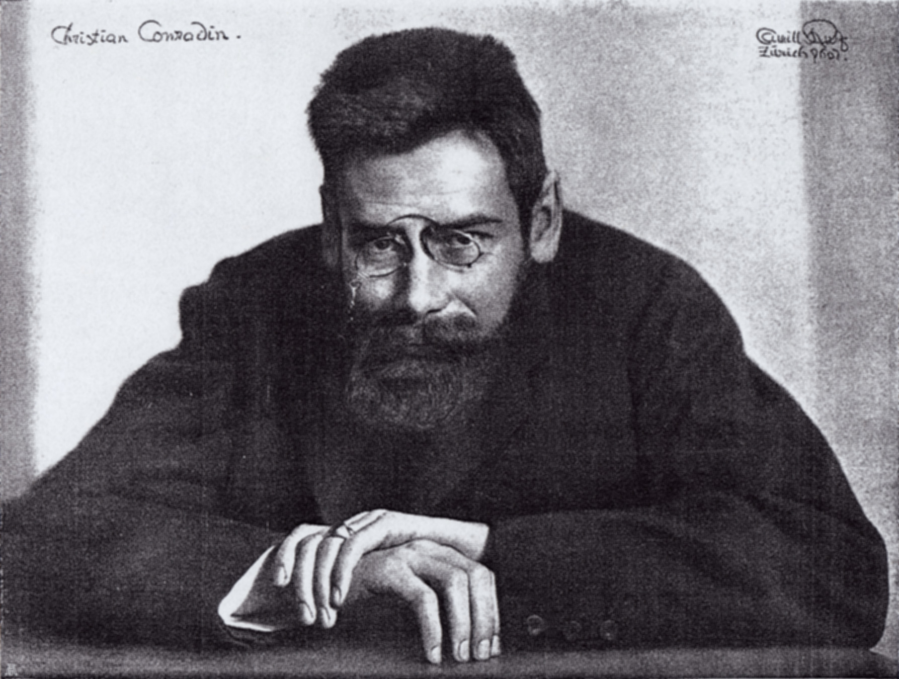 Christian Conradin - Portrait von Camille Ruf 1907